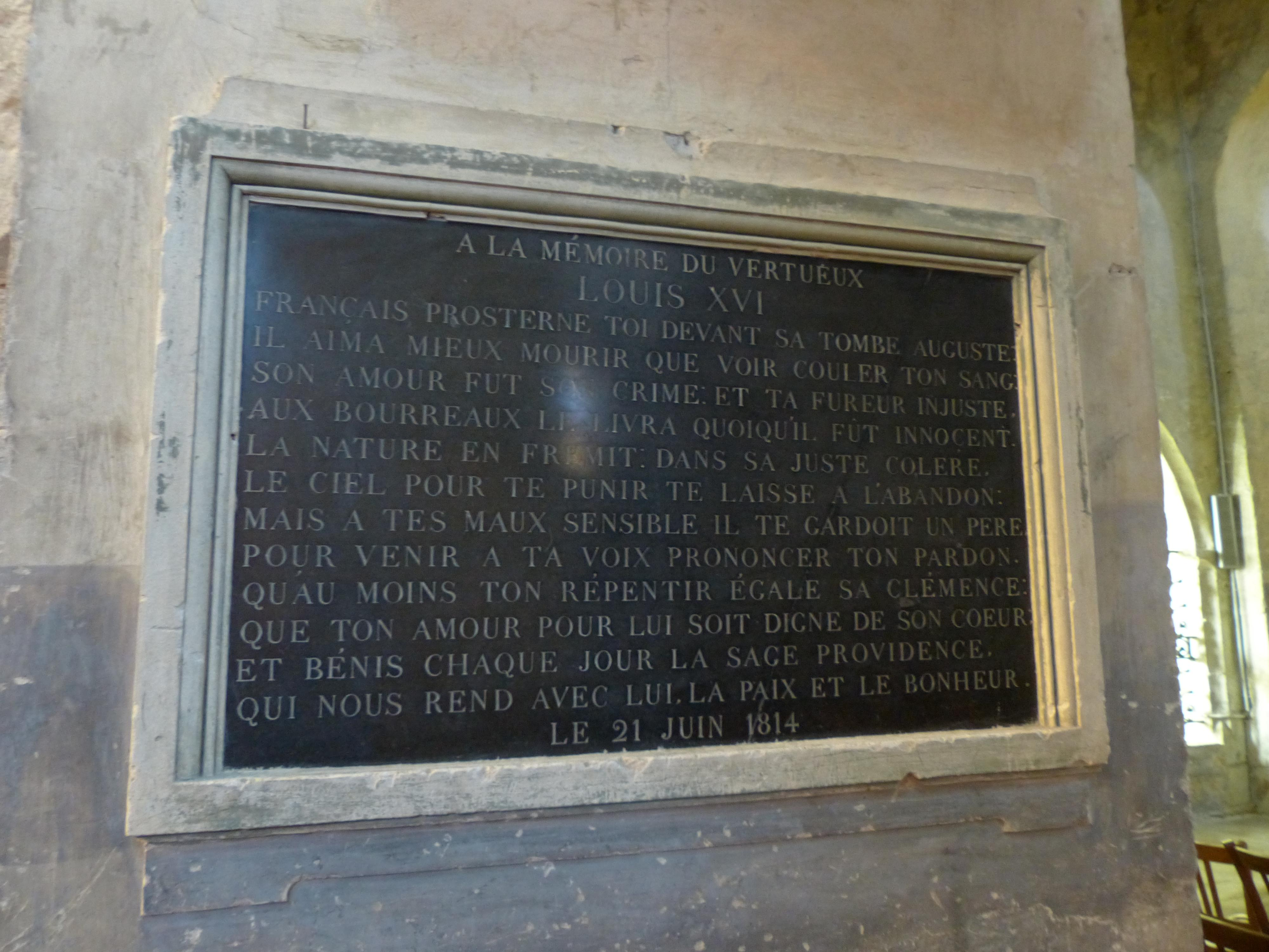 Église Saint-Martin d'Artonne, Puy-de-Dôme (France). Plaque de marbre noir en l'honneur de Louis XVI.